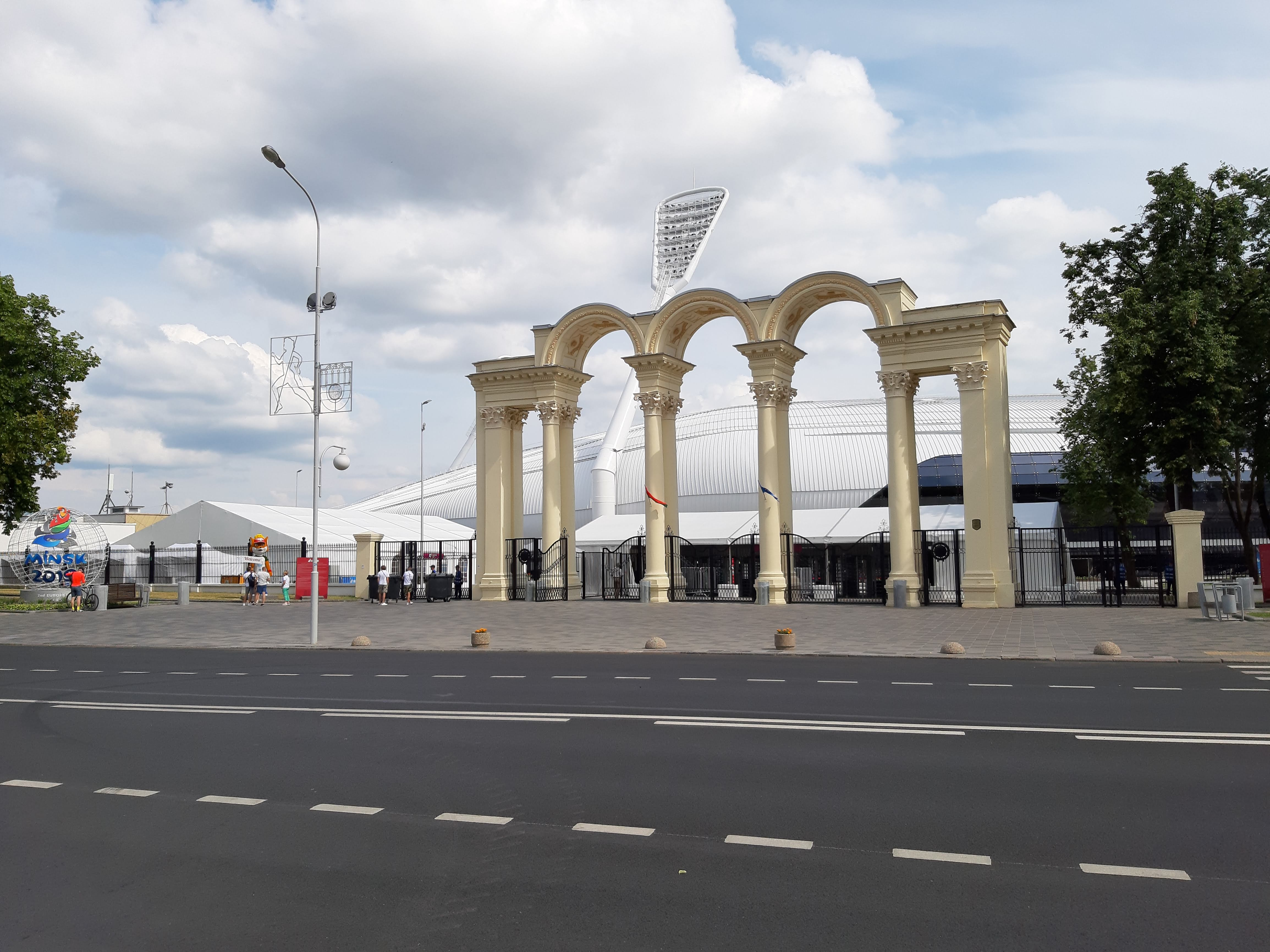 Мінск. У час Еўрагульняў